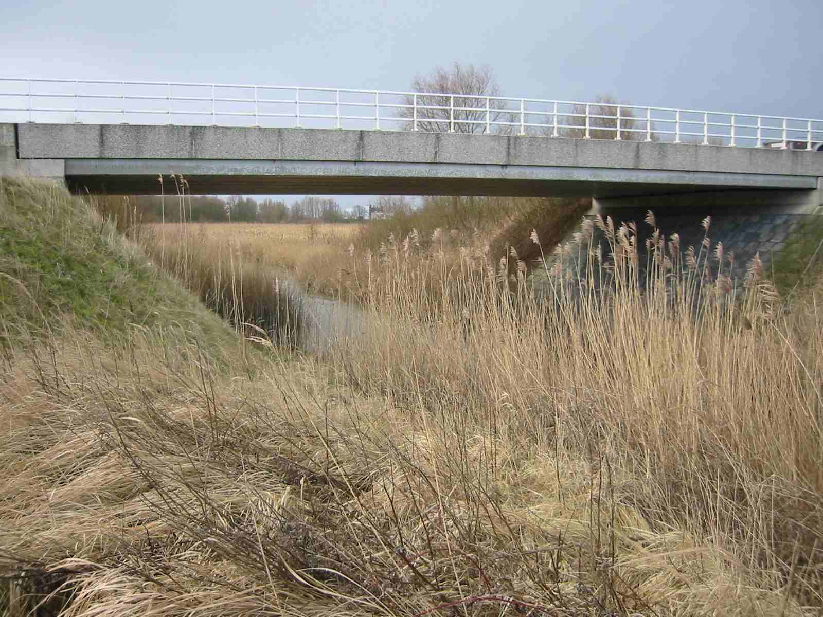 Ecopassage in de ecologische verbindingszone die de Oostvaardersplassen en het "Wilgenbos" met elkaar verbindt.